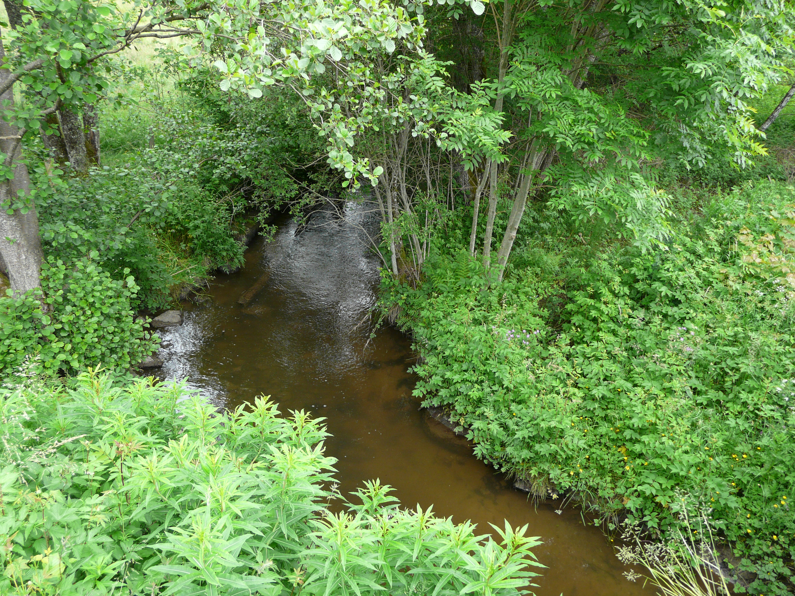 Le ruisseau de la Barricade au niveau de la route départementale 1089, Aix, Corrèze, France.